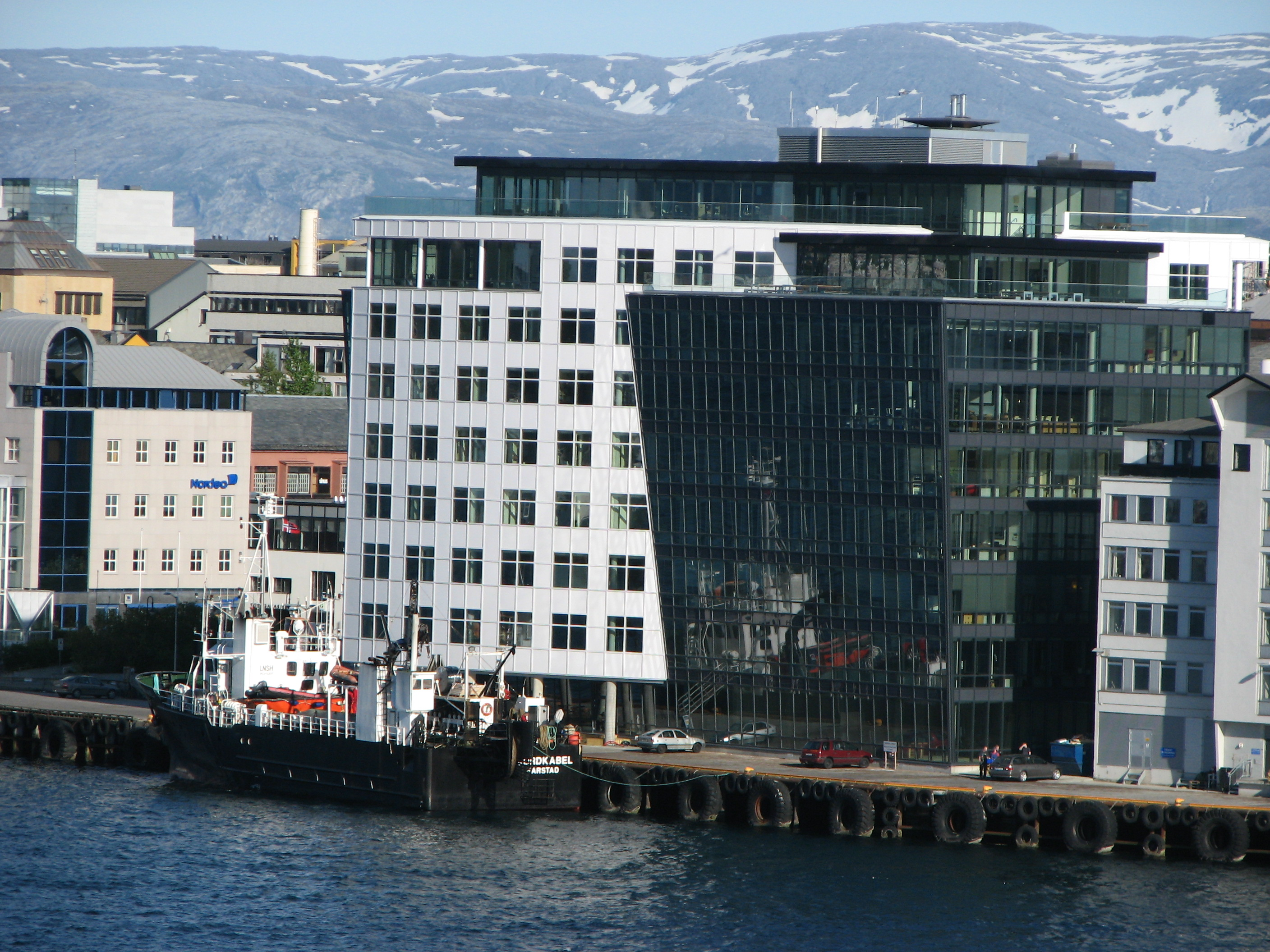 Jakhelln Brygge i Bodø, Hovedredningssentralen for Nord-Norge og Bodø Radio holder til her